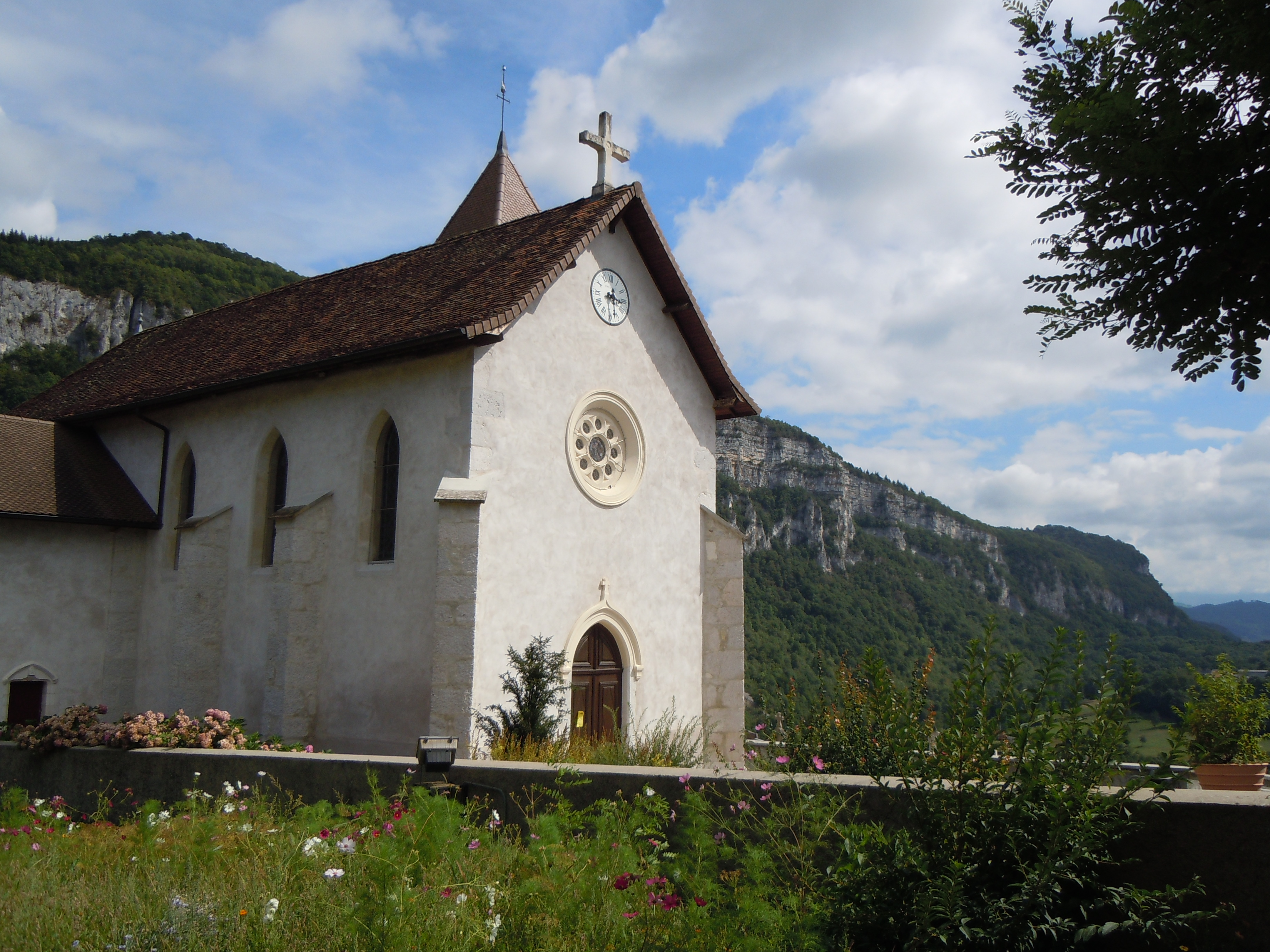 Eglise Saint-Blaise de Rochefort (Savoie)